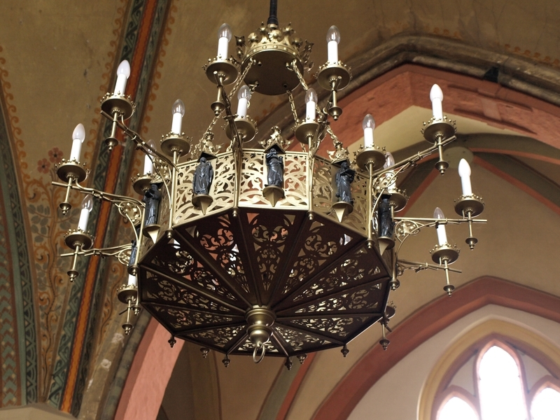 neogotischer Kronleuchter, Marienkirche Boizenburg